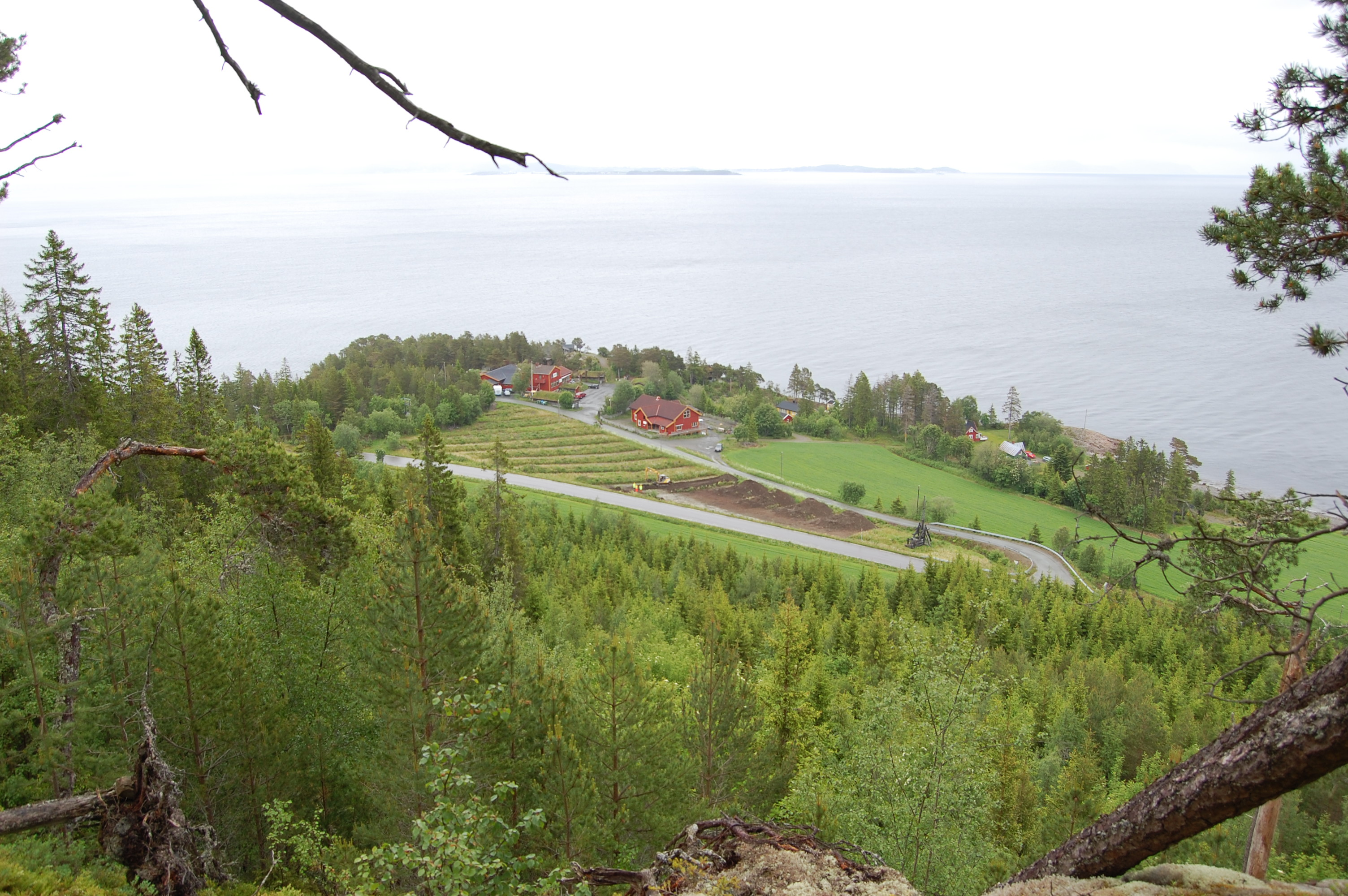 Avdekkingen er i gang - Frosta i bakgrunnen Foto: Brynja Bjørk Birgisdottir, NTNU-Vitenskapsmuseet